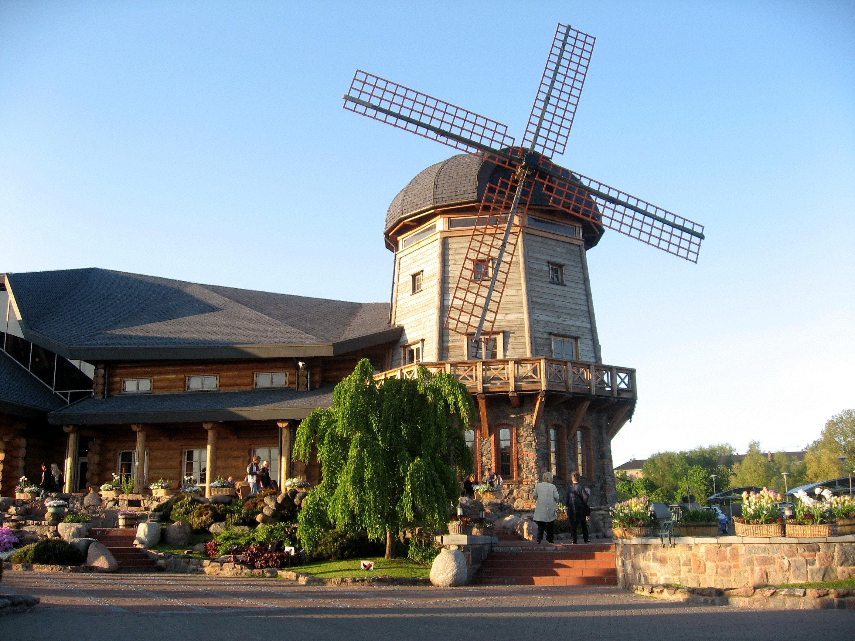 Restaurace Lido